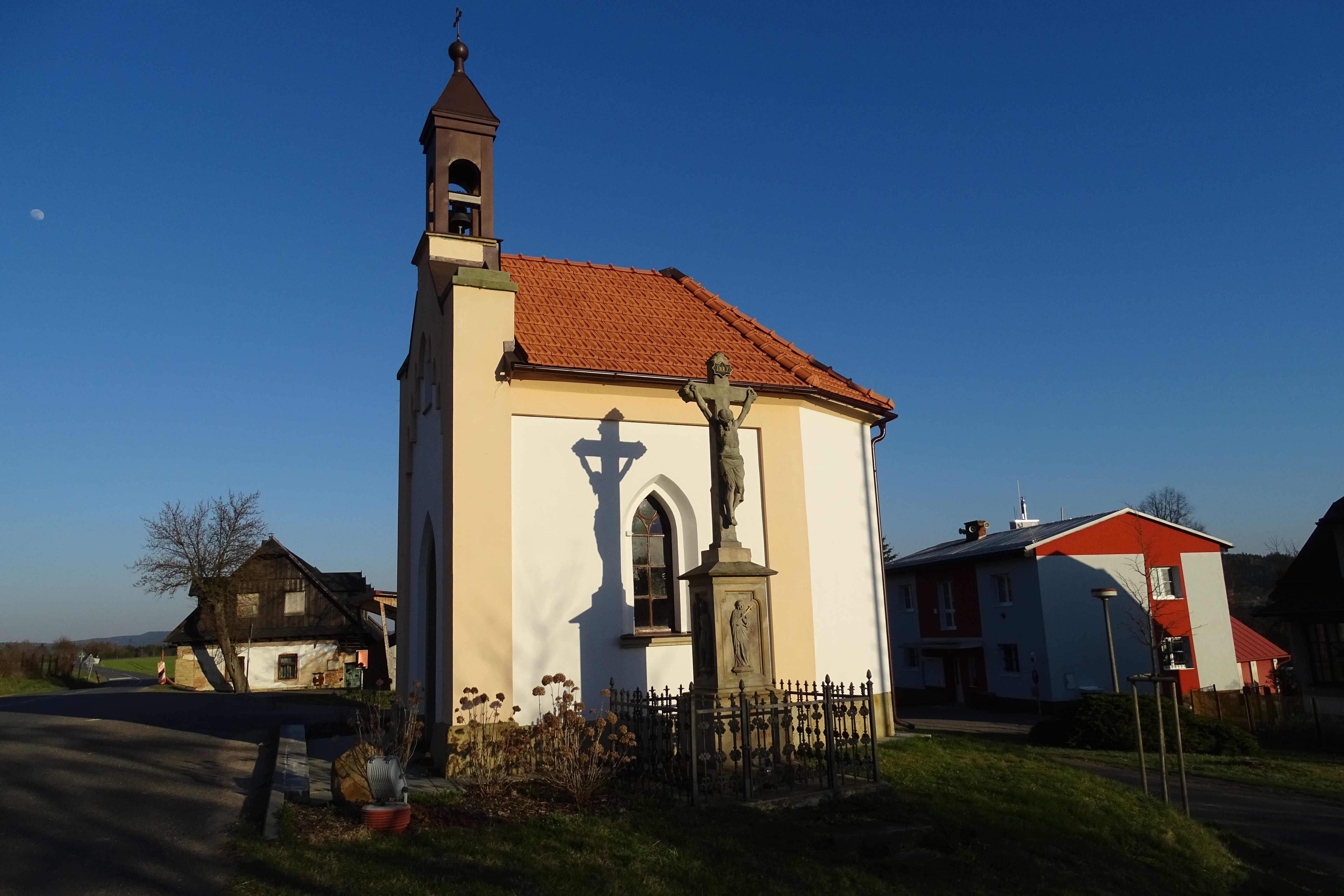 kaple